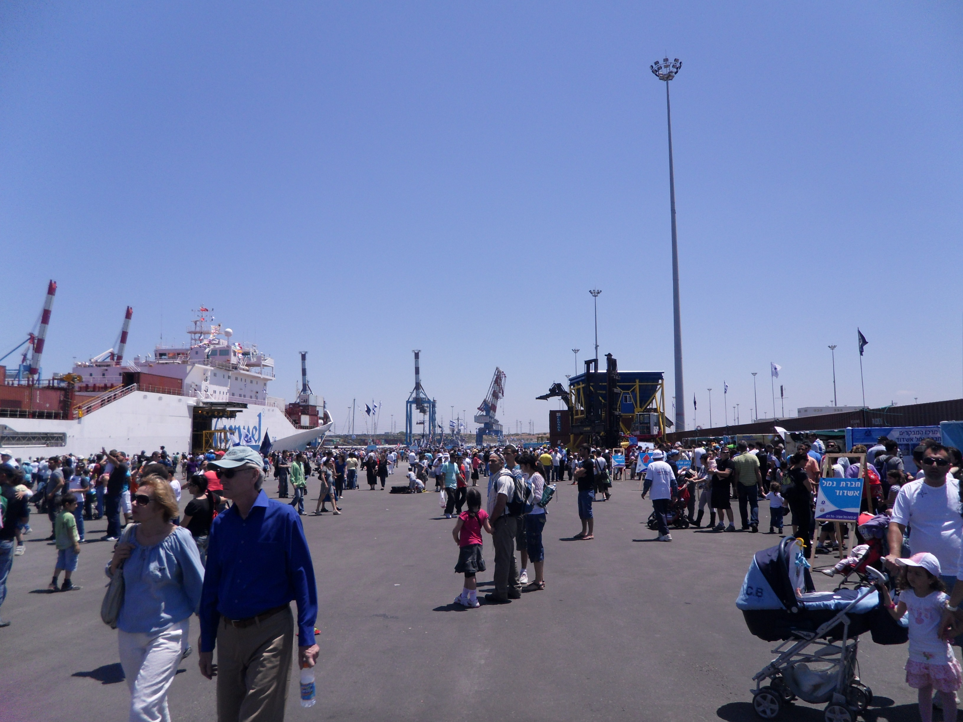 נמל אשדוד נפתח למבקרים ביום העצמאות ה-63 למדינת ישראל